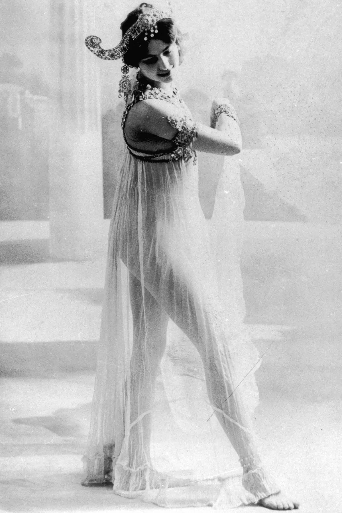 Mata Hari circa 1906